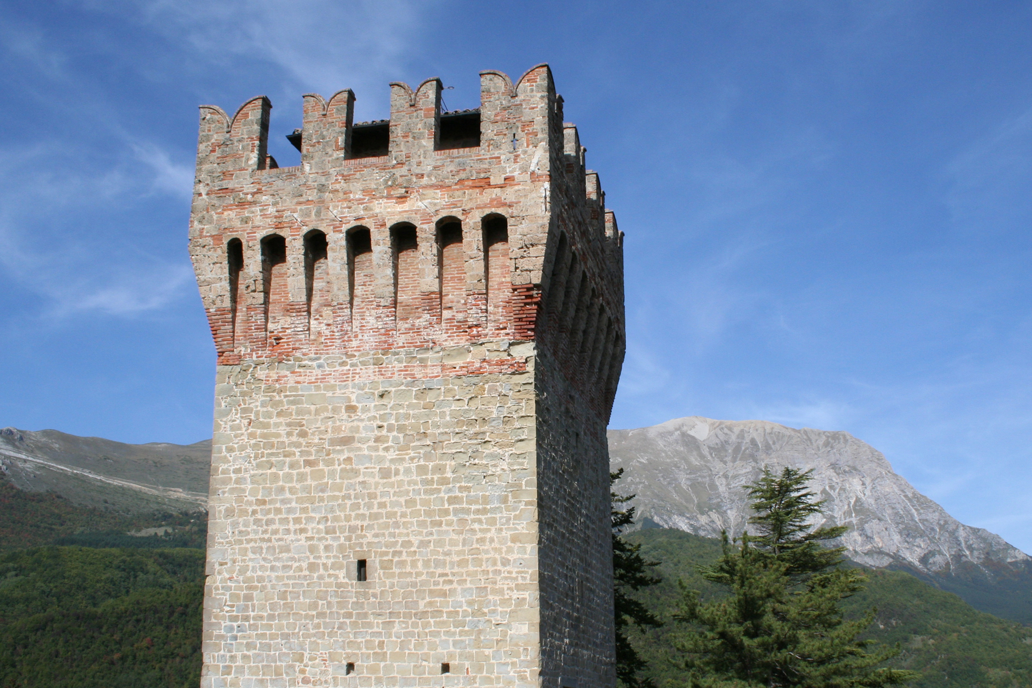 Particolare dell'opera in aggetto presente alla sommità del mastio della Rocca di Arquata del Tronto, in provincia di Ascoli Piceno.